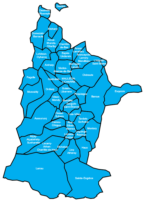 Comunas de Sola